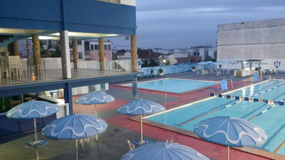 Estruturas do Ramos Social Clube